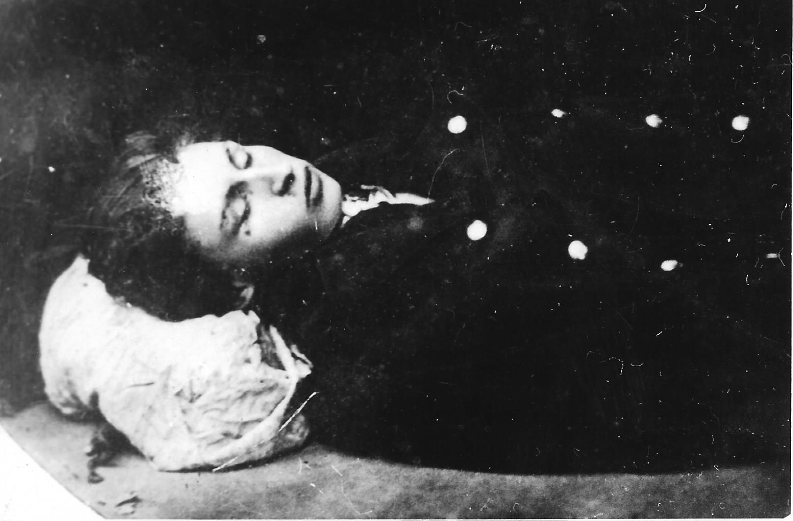 Zdjęcie pośmiertne wykonane 9 kwietnia 1861 (kostnica szpitala Sw. Rocha)